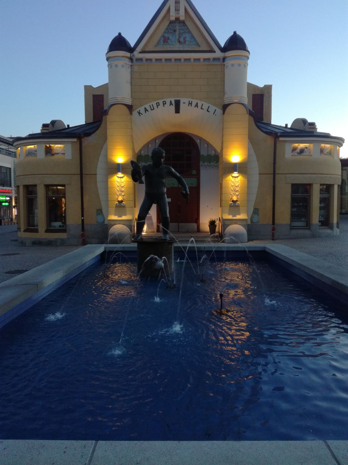 Kuopion kauppahalli ja Veljmies-patsas remontin jälkeen 2017.